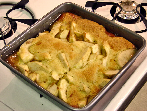 Apple cobbler. Recipe available at